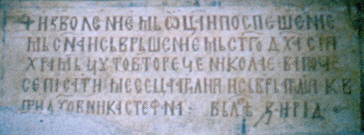 Ктиторският надпис от 1606 г. на вътрешната страна на западната стена на църквата в Планиничкия манастир, Царибродско. Надписът гласи: "С благоволението на Отца, с помощта на сина и изпълненето на Светия дух този храм на чудотвореца Николай започва да се изписва през месец април по времето на духовник Стефан в лето 7114"